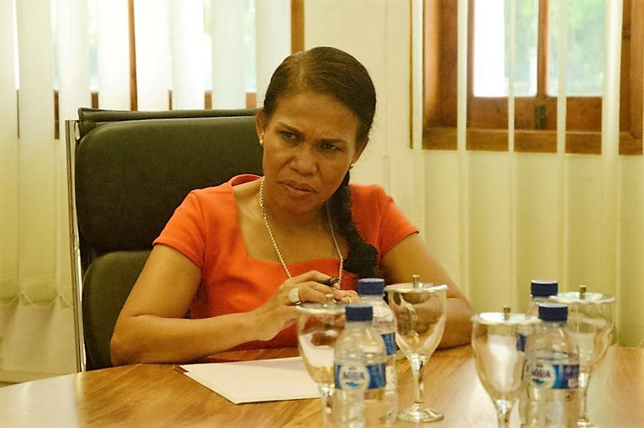 Tetun: Prezidente Tribunal Rekursu Em Subtituisaun Maria Natércia Gusmão Perreira